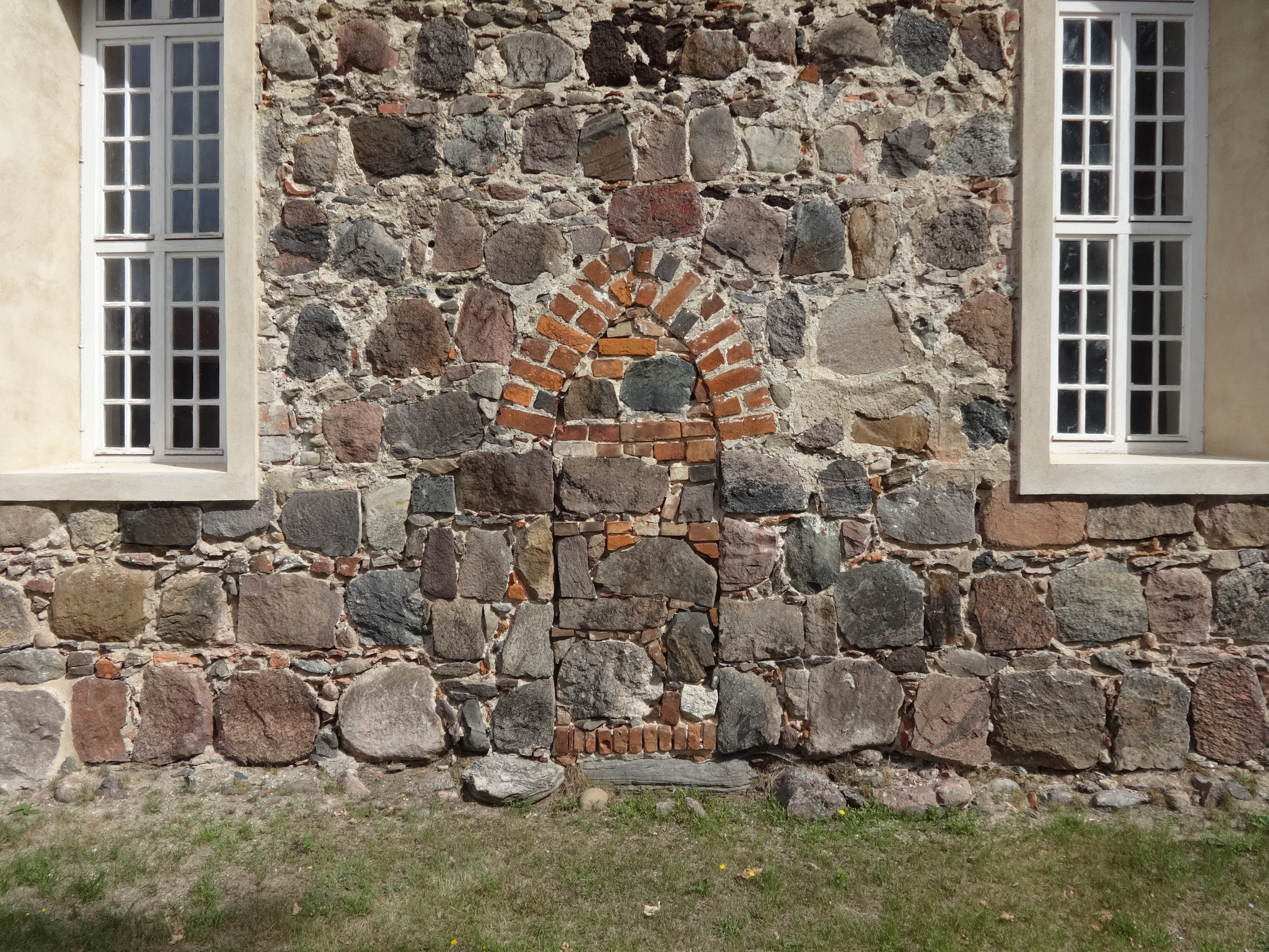 Die Dorfkirche in Frankenförde in der Gemeinde Nuthe-Urstromtal ist eine Feldsteinkirche aus der Zeit um 1300. In seinem Innern befinden sich ein Kanzelaltar aus dem 18. Jahrhundert und eine Empore aus der Zeit um 1700.